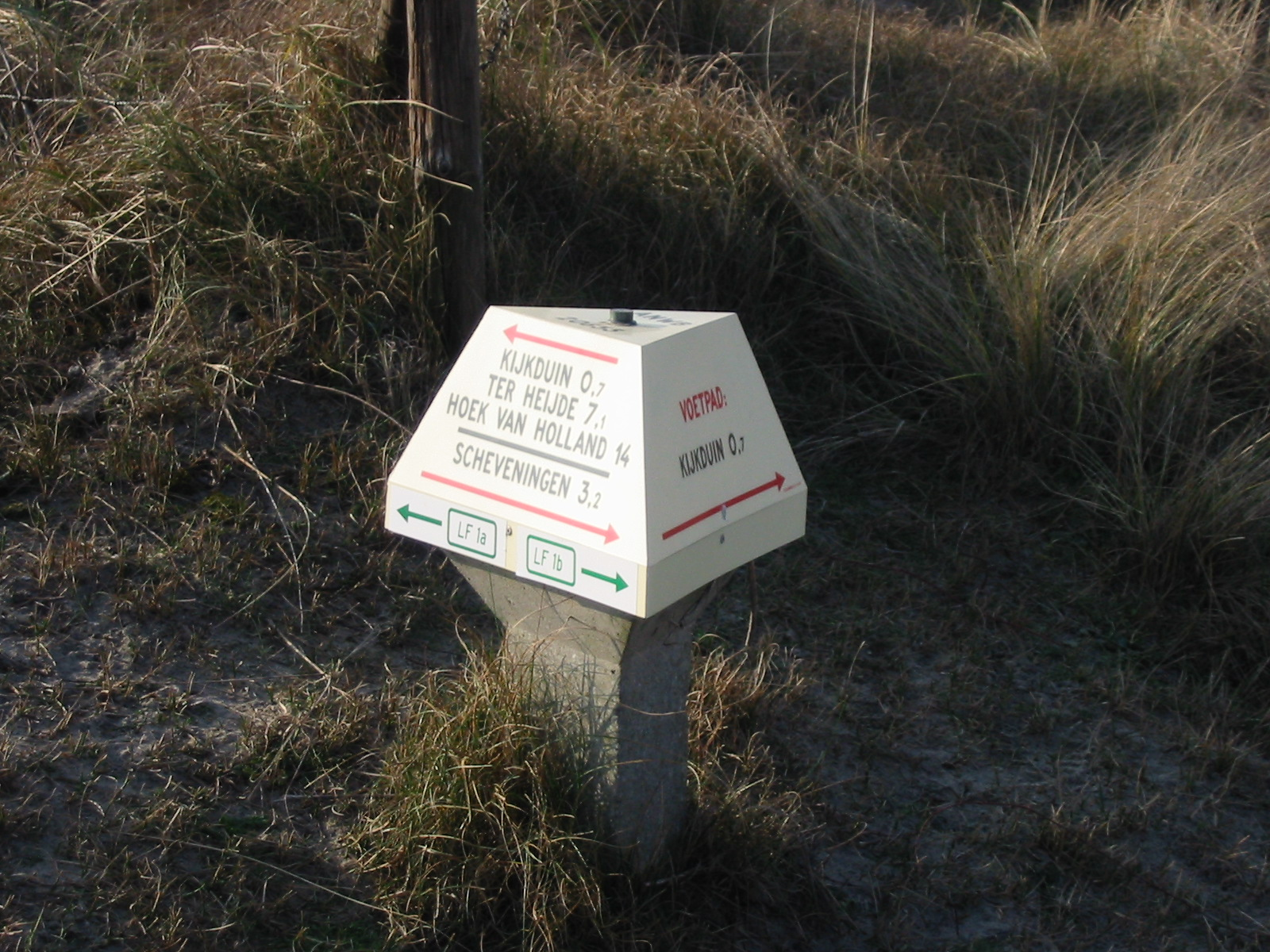 Paddenstoel van de ANWB in de Haagse Duinen bij Kijkduin. Het bijzondere aan deze is dat hij driehoekig is.